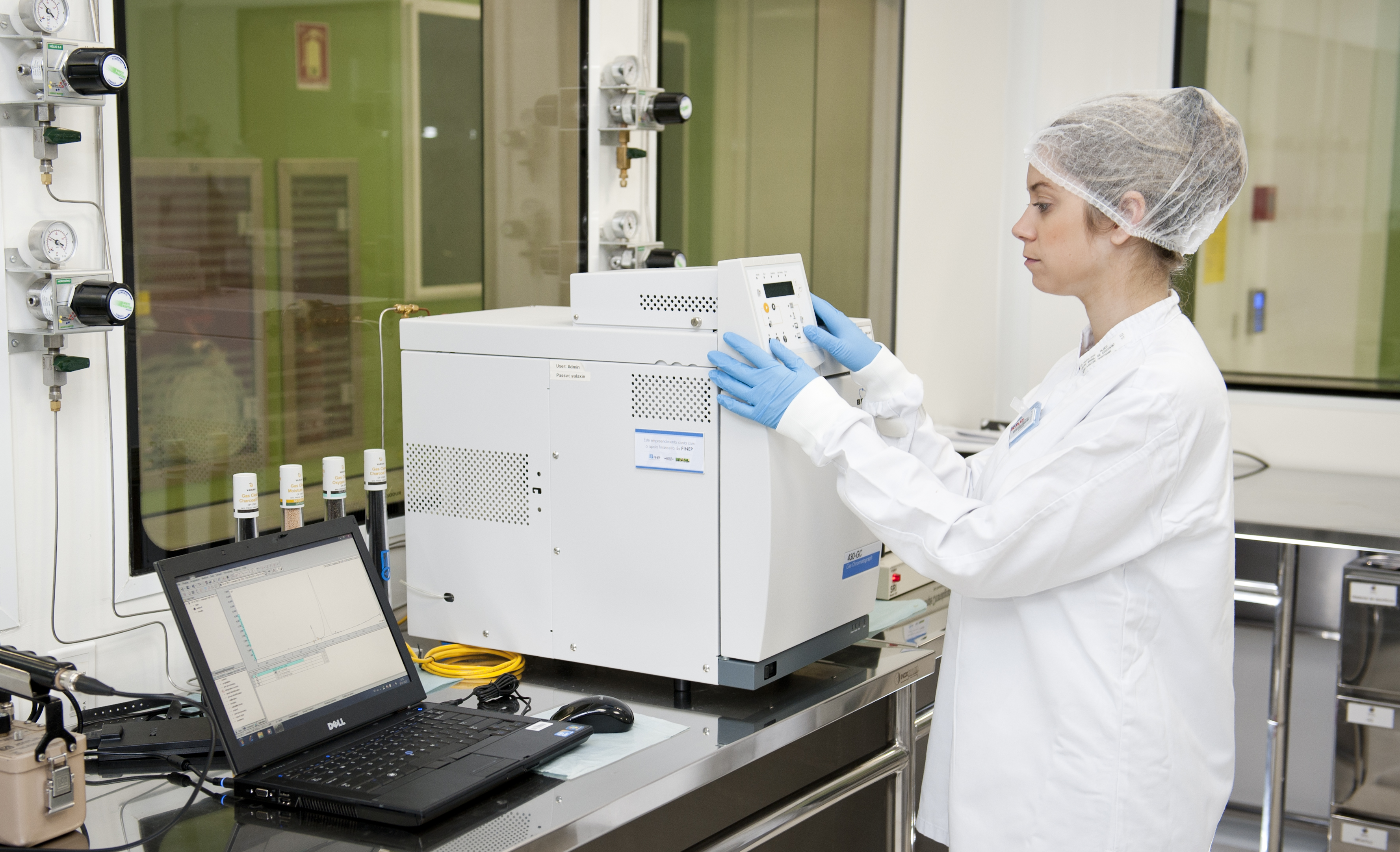 Inscer